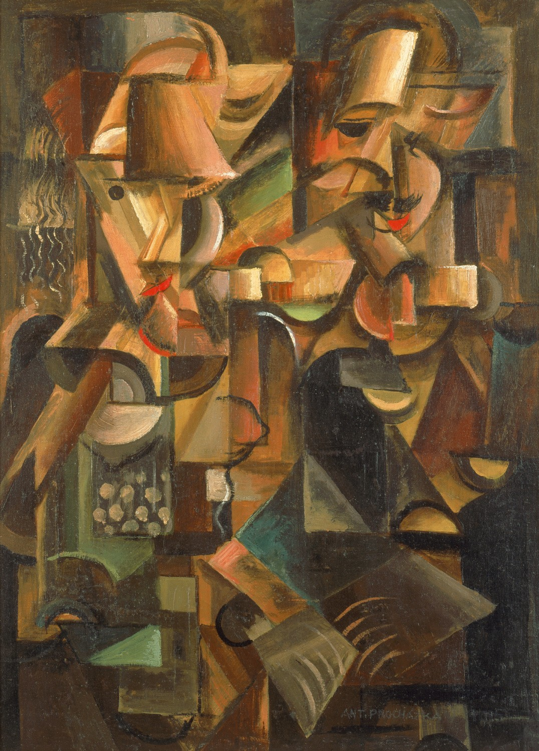 Obraz Muž a žena malíře Antonína Procházky z roku 1911. Olej, plátno; 60×44,5 cm, získáno 1965, Muzeum umění Olomouc, inv. č. O 1136